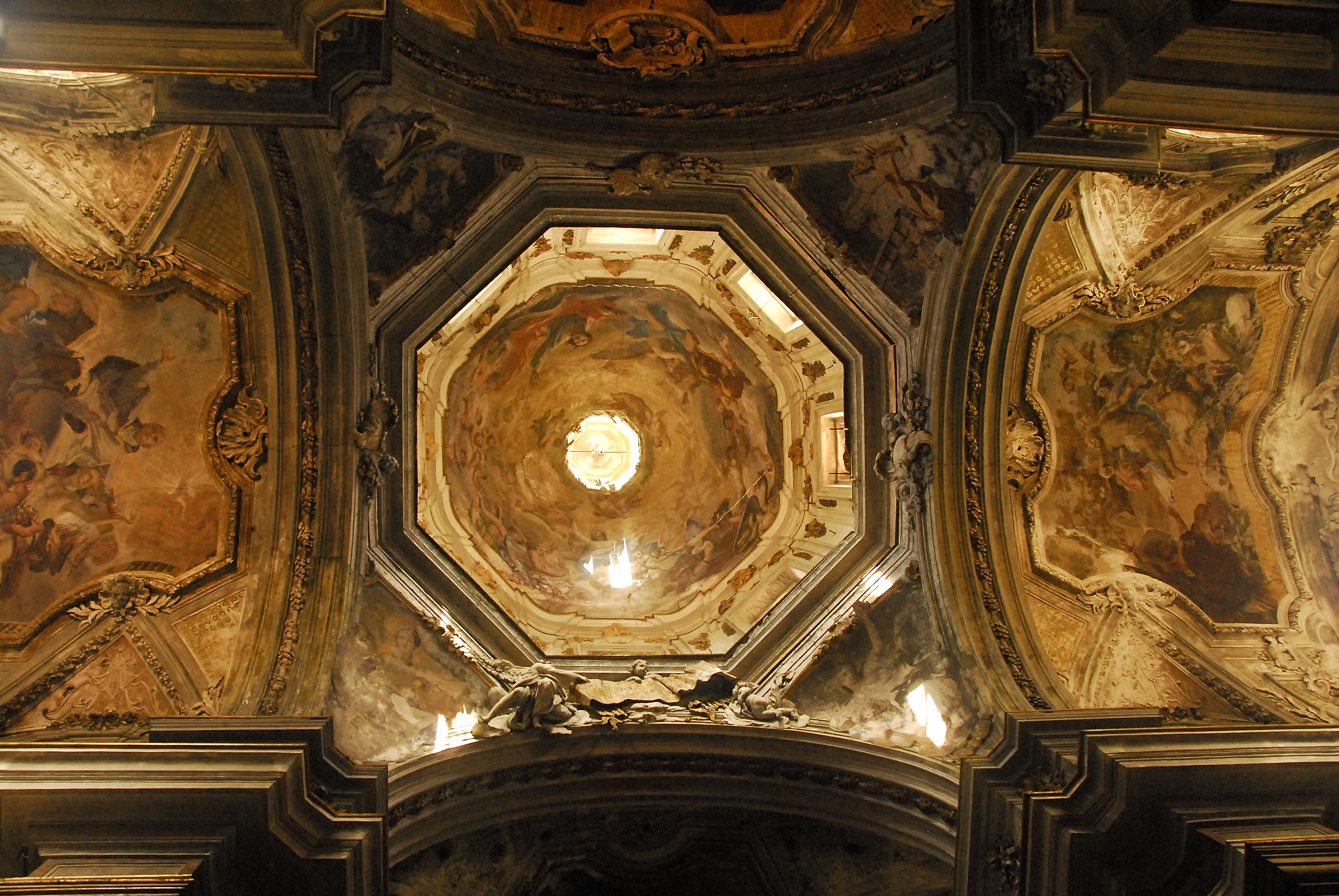 Palermo, ITA